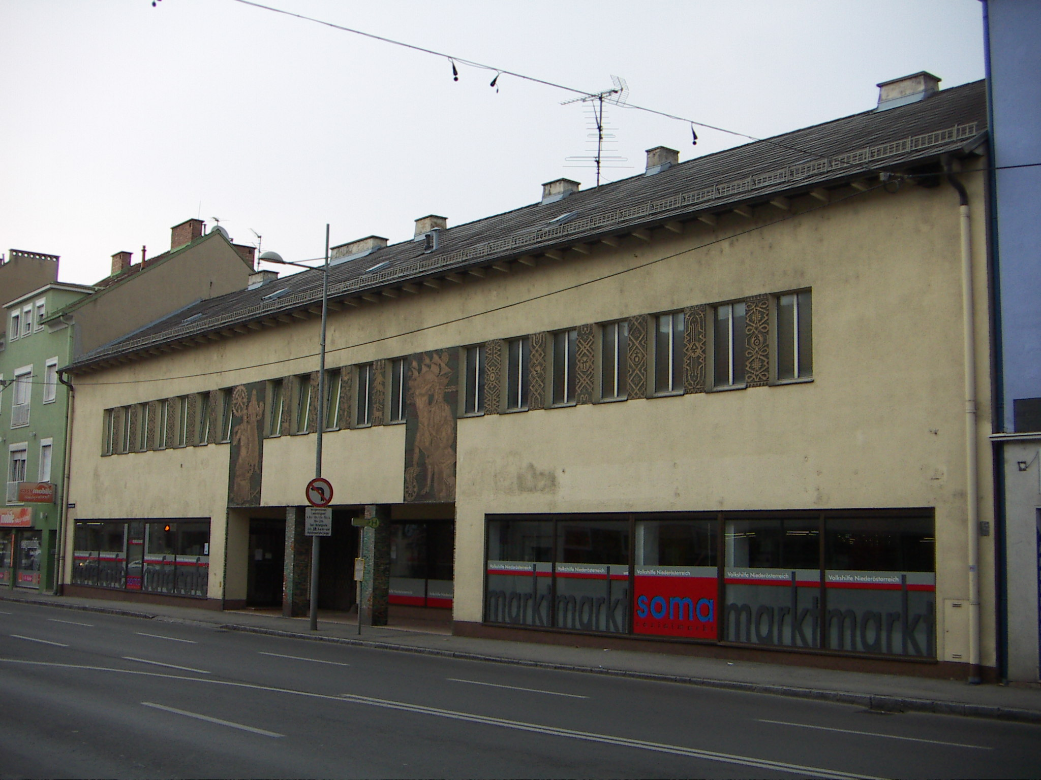 Sozialmarkt (Einzelhandel) der Volkshilfe Niederösterreich in Wiener Neustadt